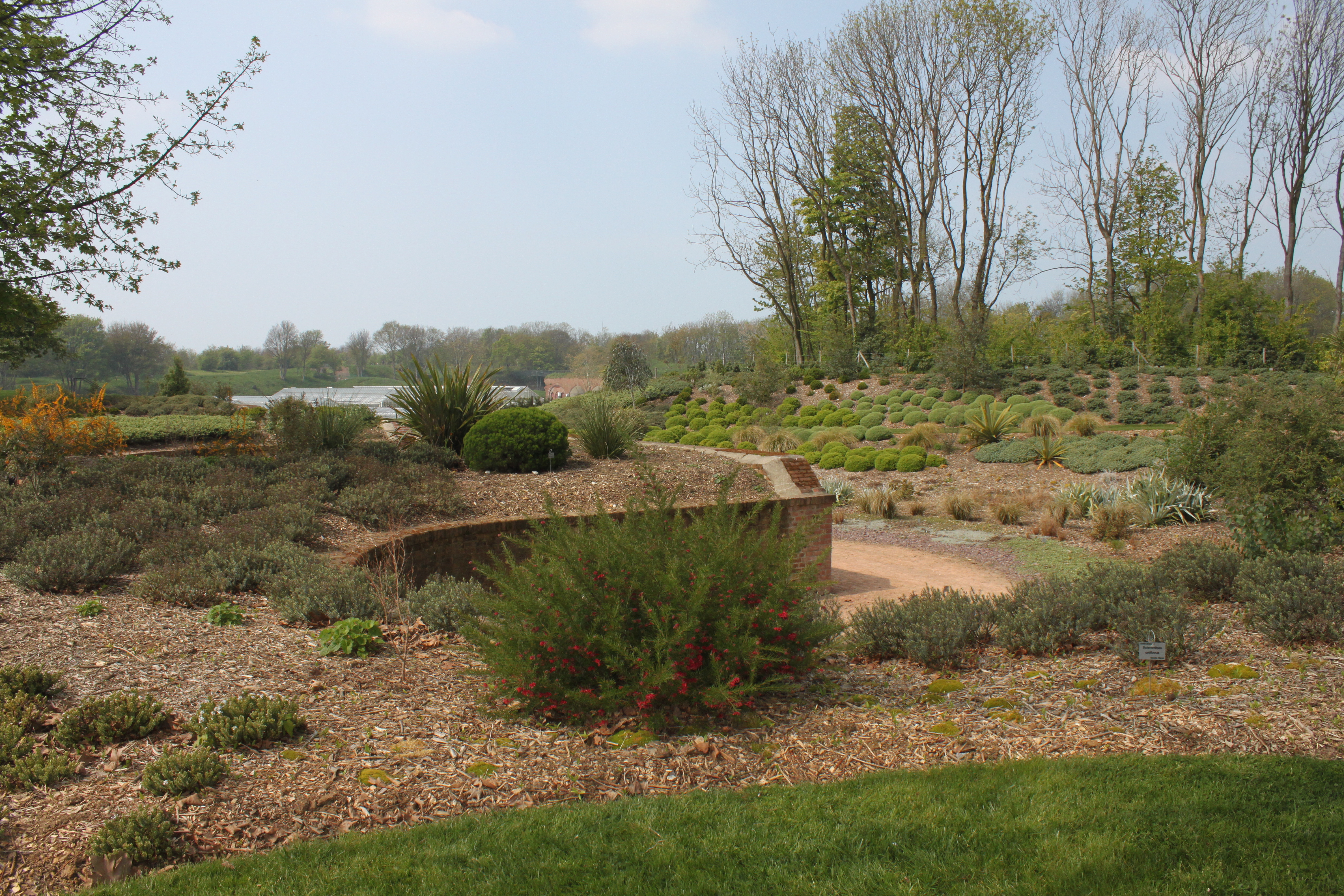 Le Havre - Jardins Suspendus - jardin des plantes australes